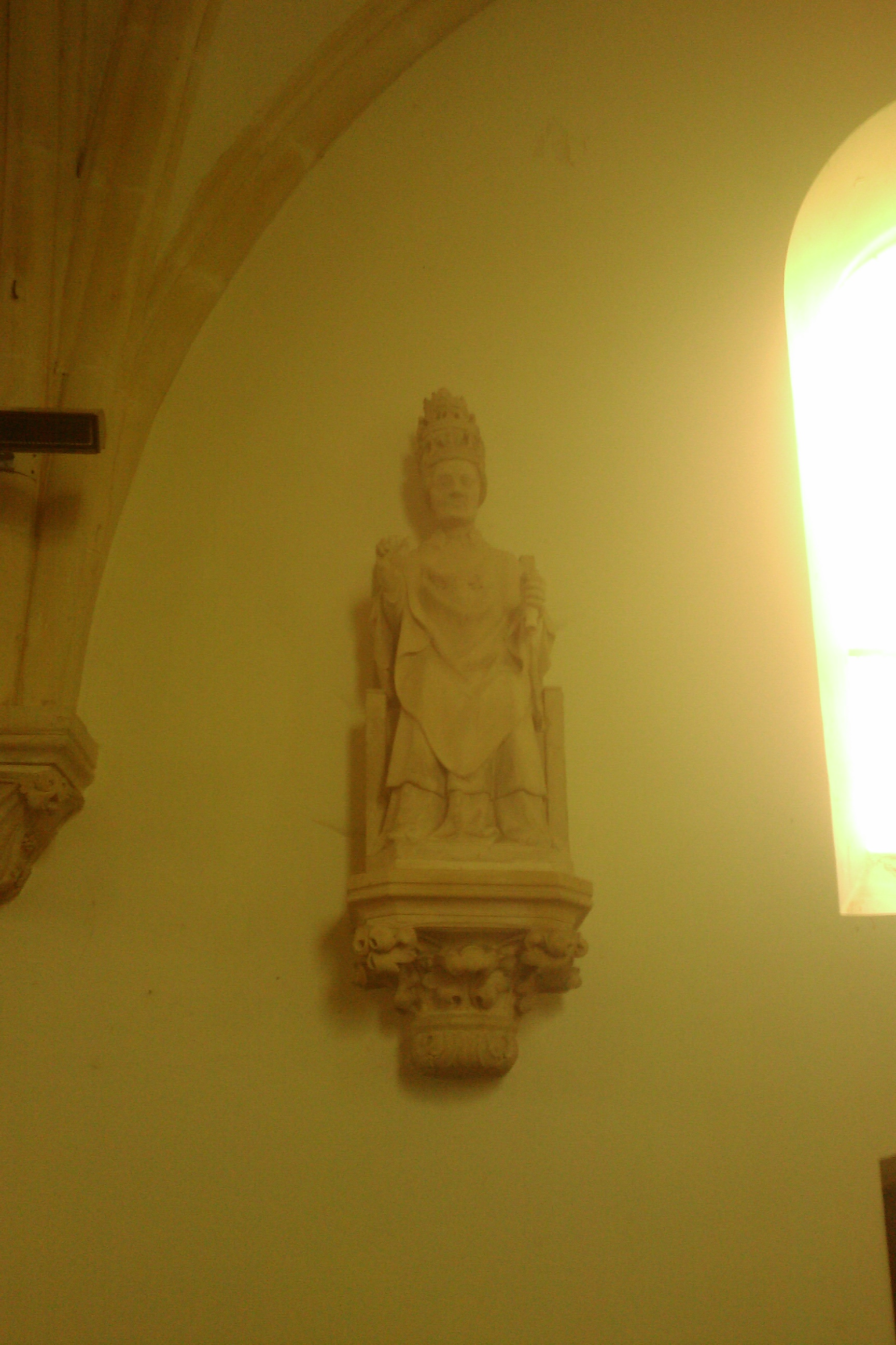 Saint Pierre est représenté assis, avec la tiare et la chasuble., XVe